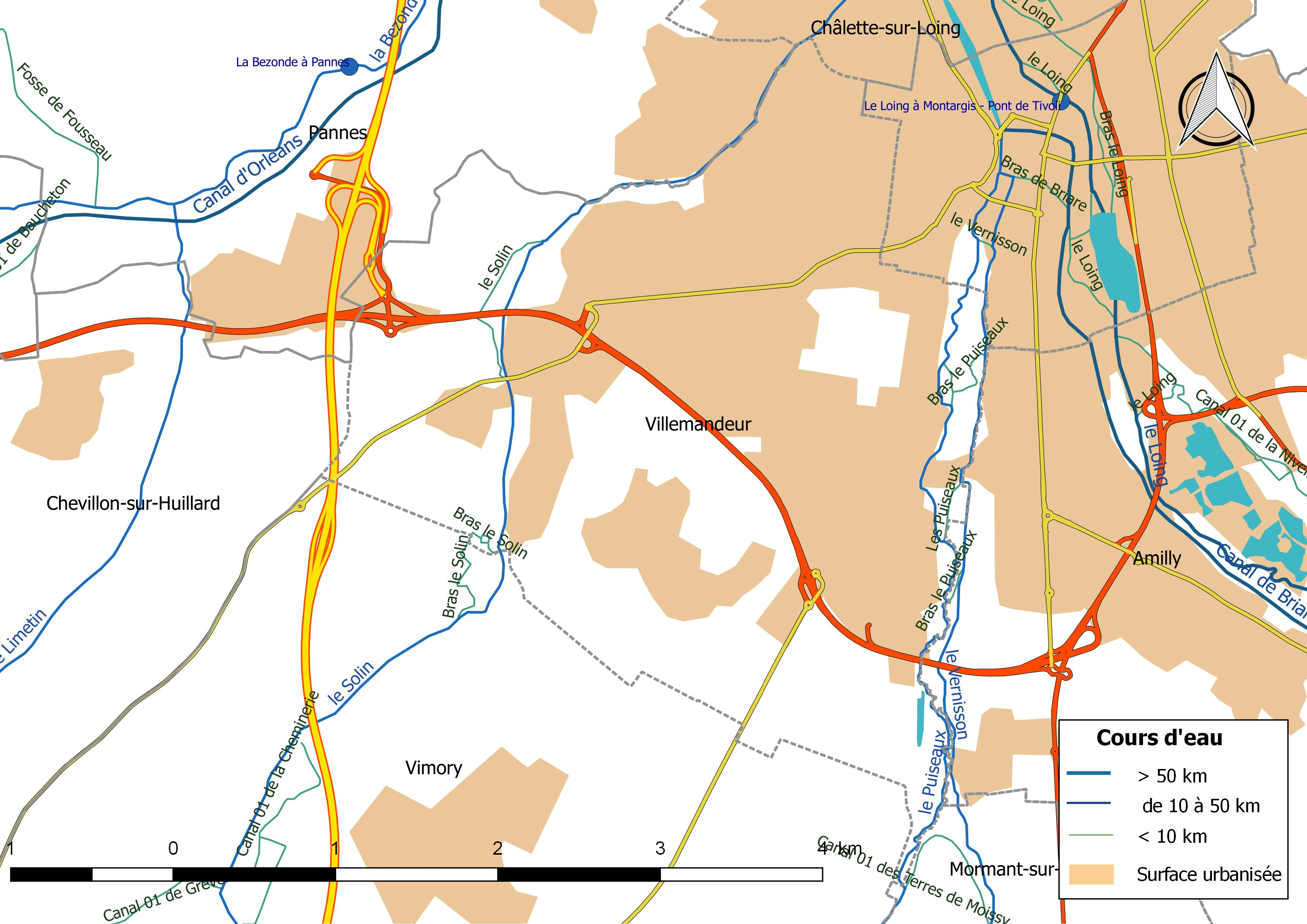 Carte du réseau hydrographique de la commune de Villemandeur (France).